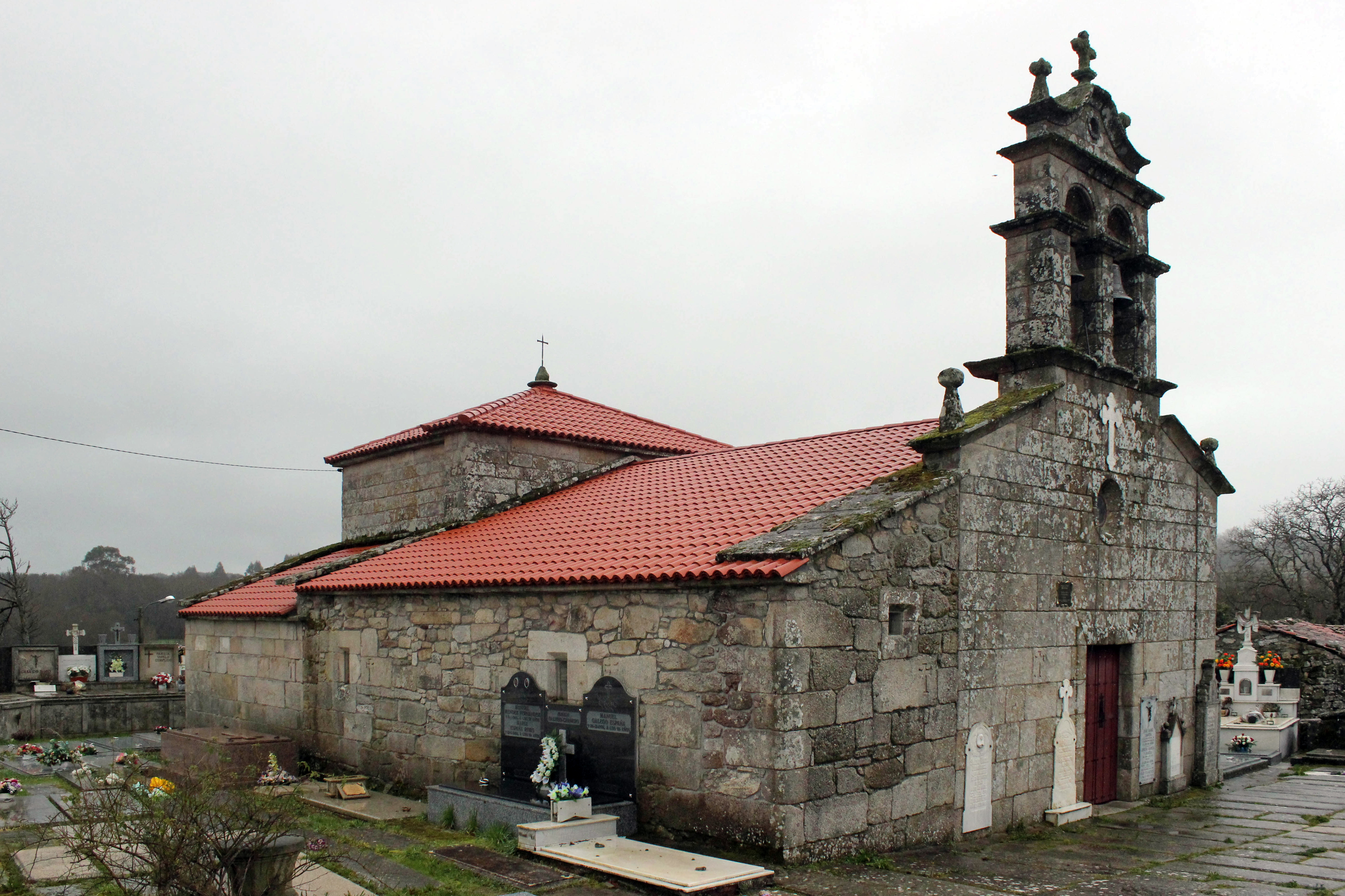 Igrexa de Santo Estevo do Castro de Amarante, no concello da Antas de Ulla.